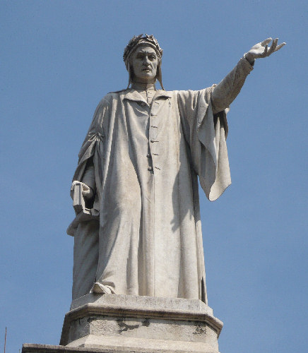 Statua di Dante nell'omonima piazza, Napoli.